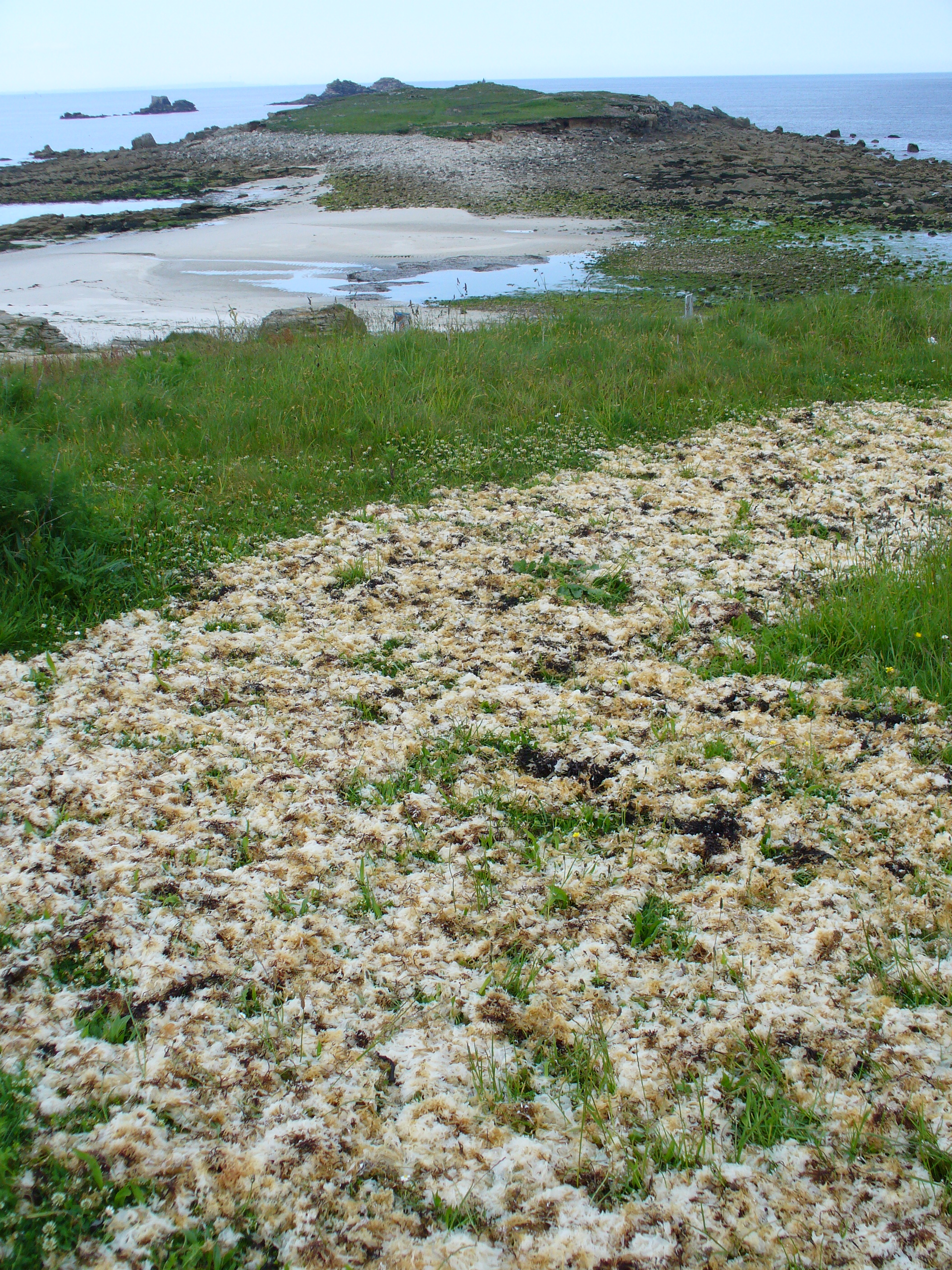 Séchage du goemon devant l'Ile Segal à Plouarzel (29)